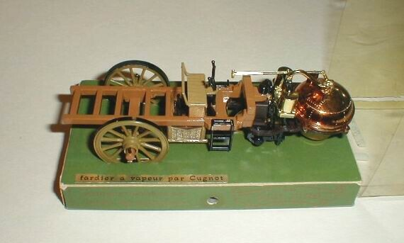 Brumm modello X01. Made in Italy. Antico carro a vapore di Cugnot (1769). Scala 1/43 Conservato al "Museon" (Olanda) e al "Musèe des Arts et Métiers" (Parigi)